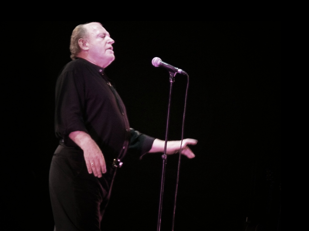 Joe Cocker